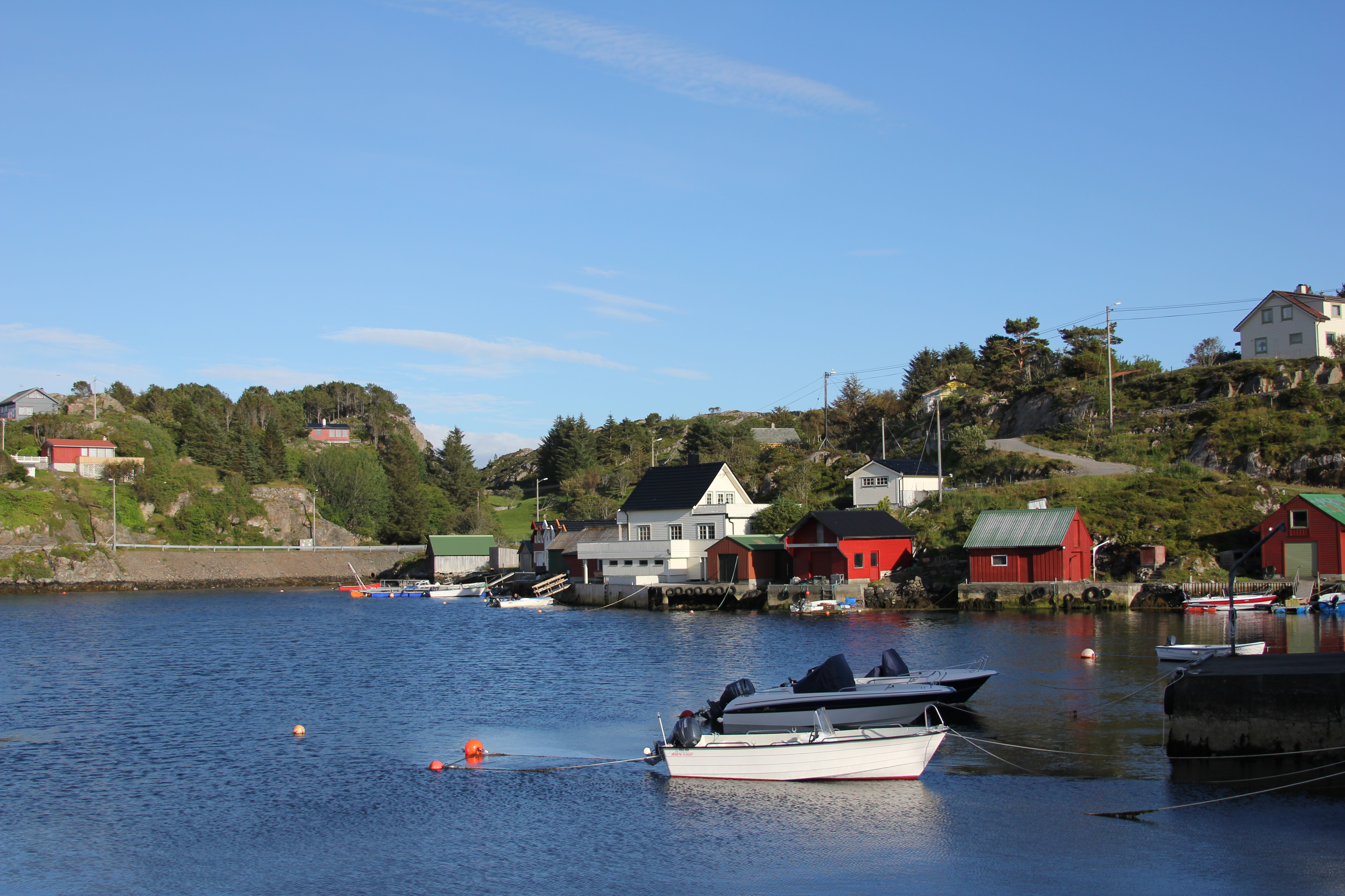 Hellesundet in Øygarden, Norway